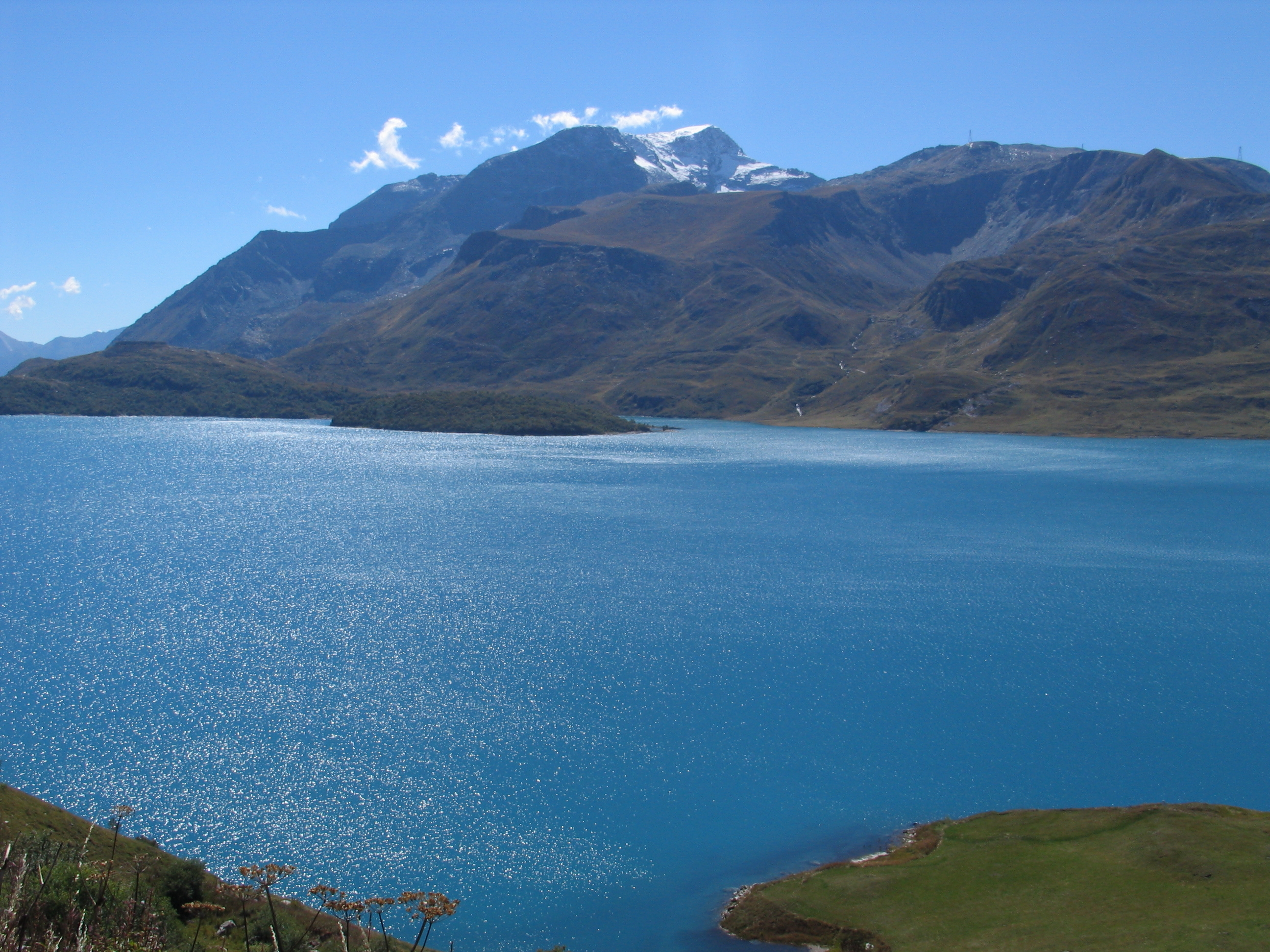 Col du Mont Cenis mit Stausee, Alpenpass Frankreich